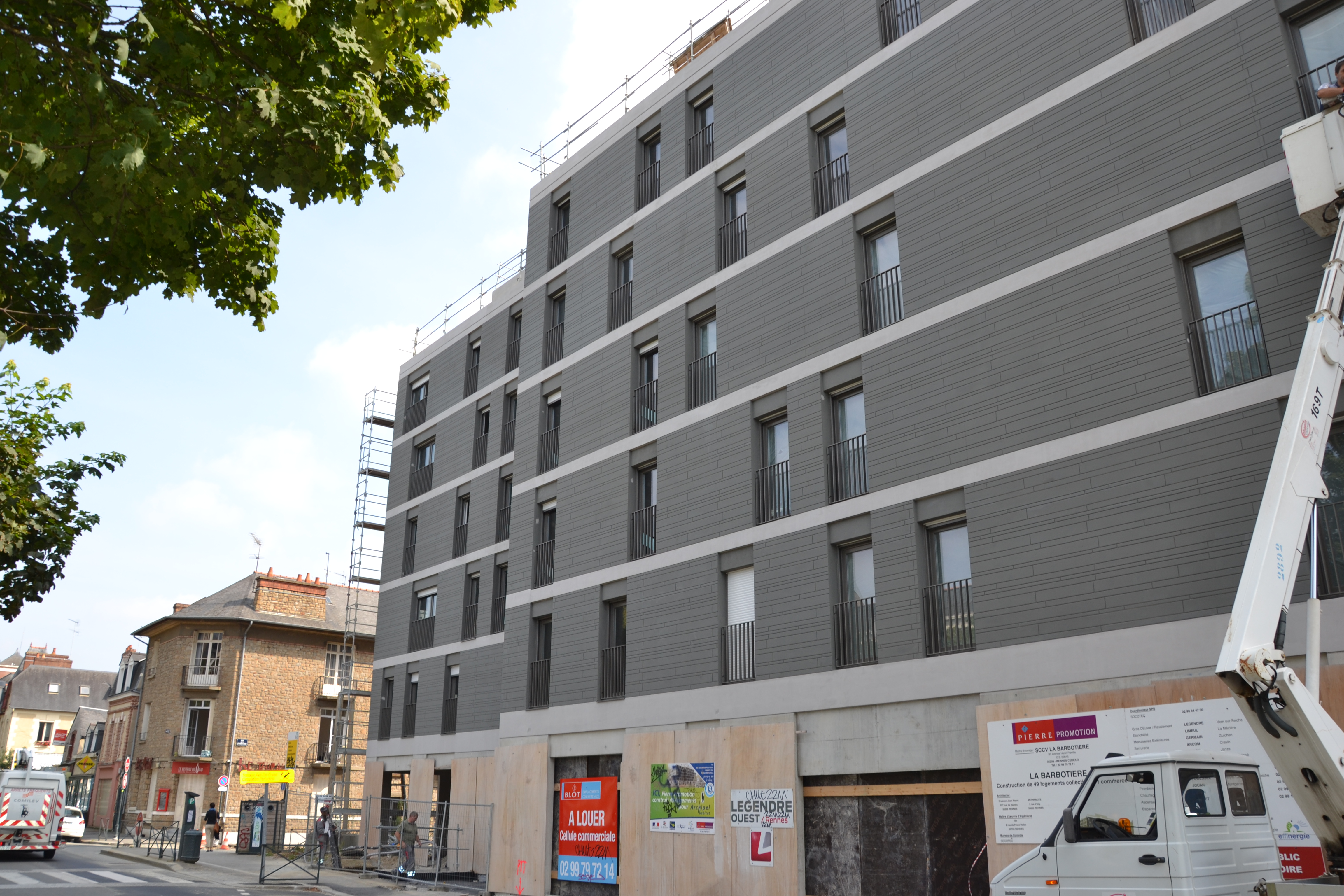 Immeuble à l'Angle de l'Avenue Maginot et de la Rue la Barbotière à Rennes (35).